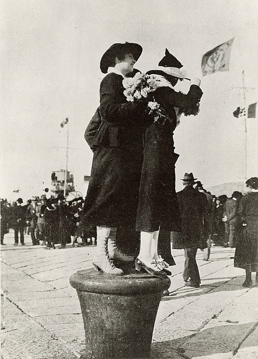 Donne a Trieste gettano fiori al passaggio del Re